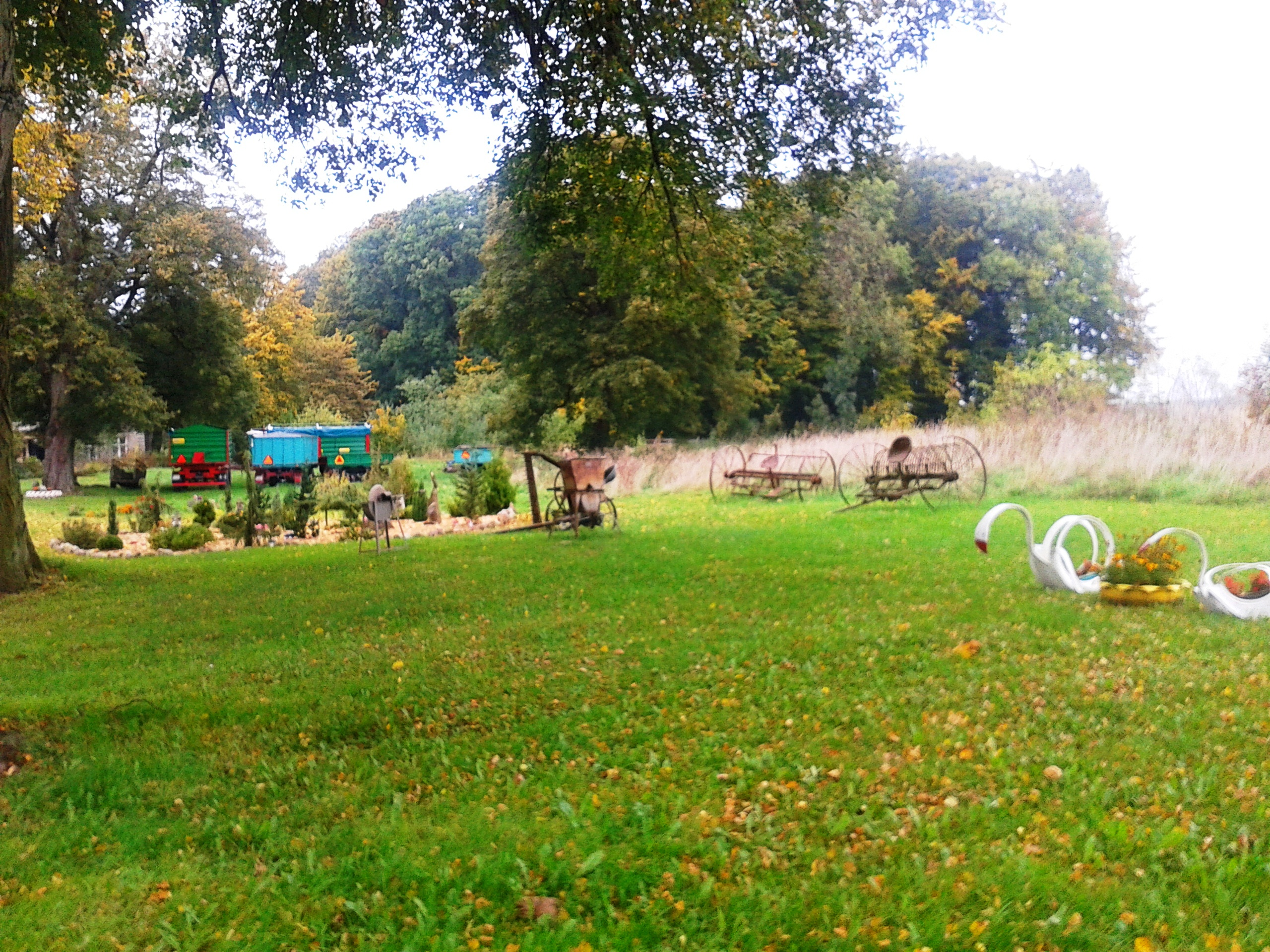 Łobżany 12